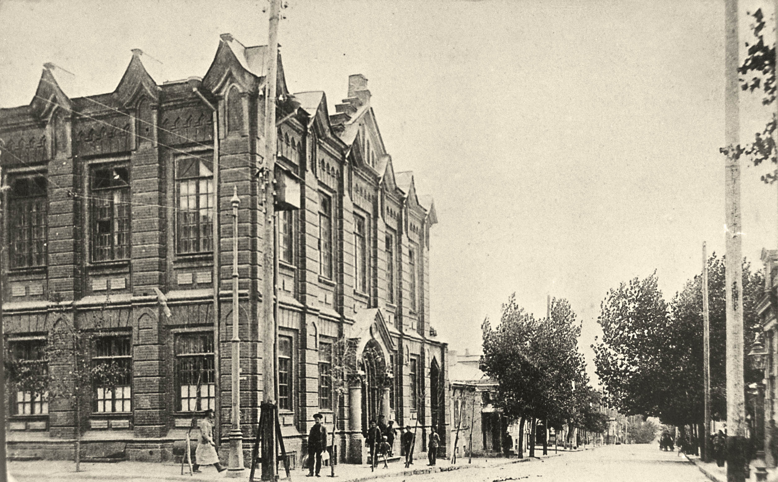 Синагога ремесленников. Ростов-на-Дону